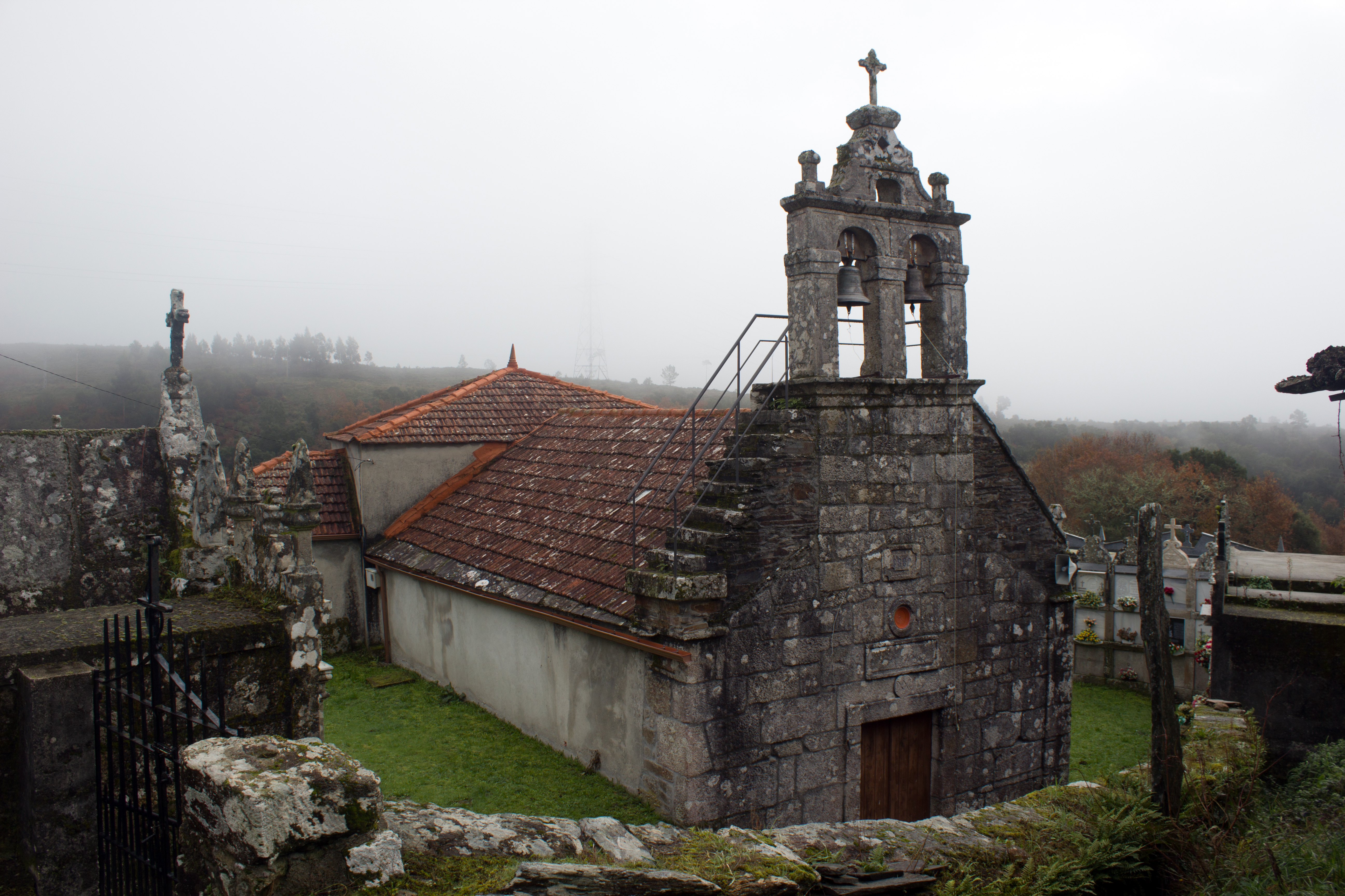 Igrexa de Moreiras, Boborás.